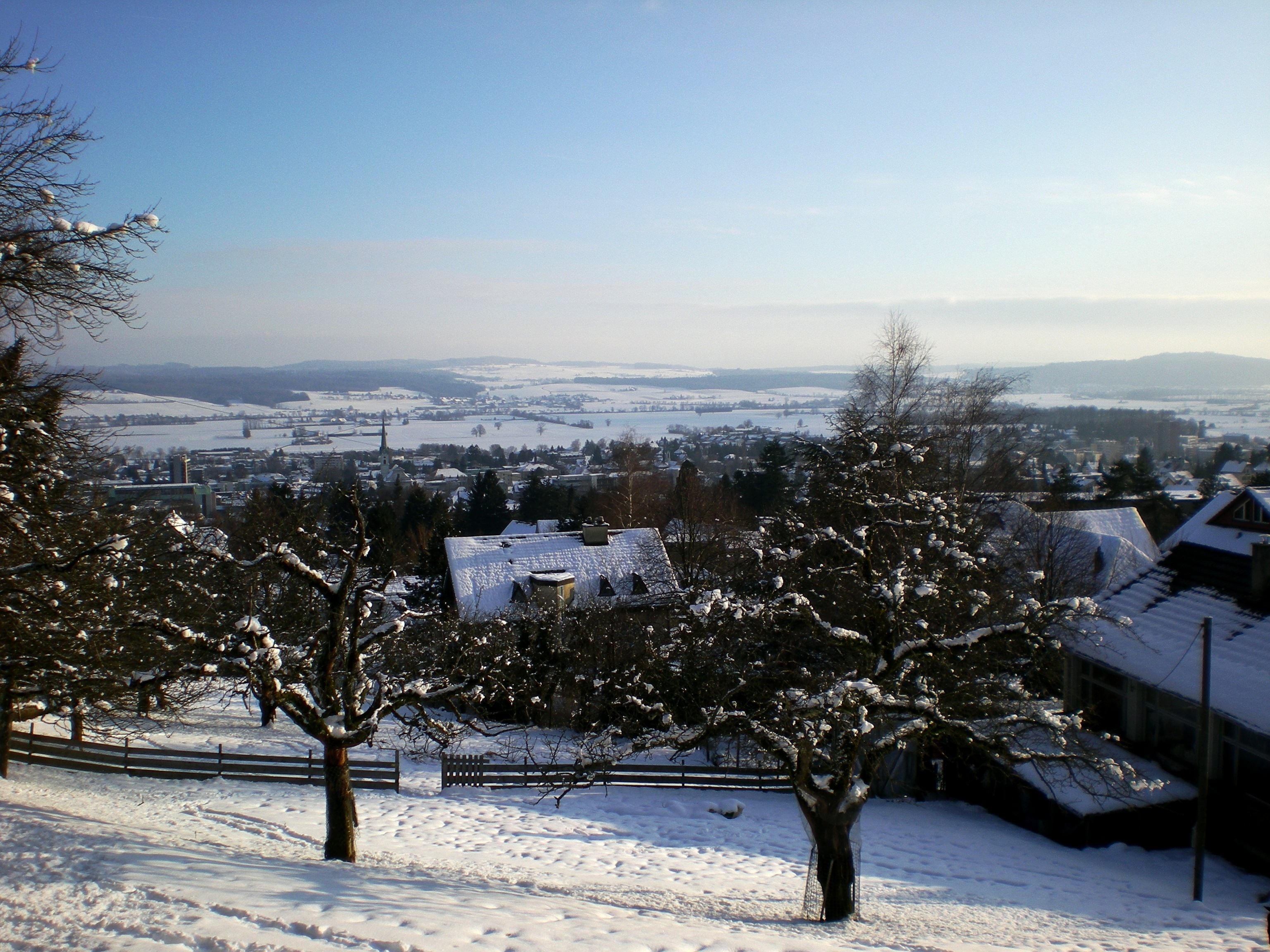 Kirche Grenchen vom Waldrand Nord aus gesehen